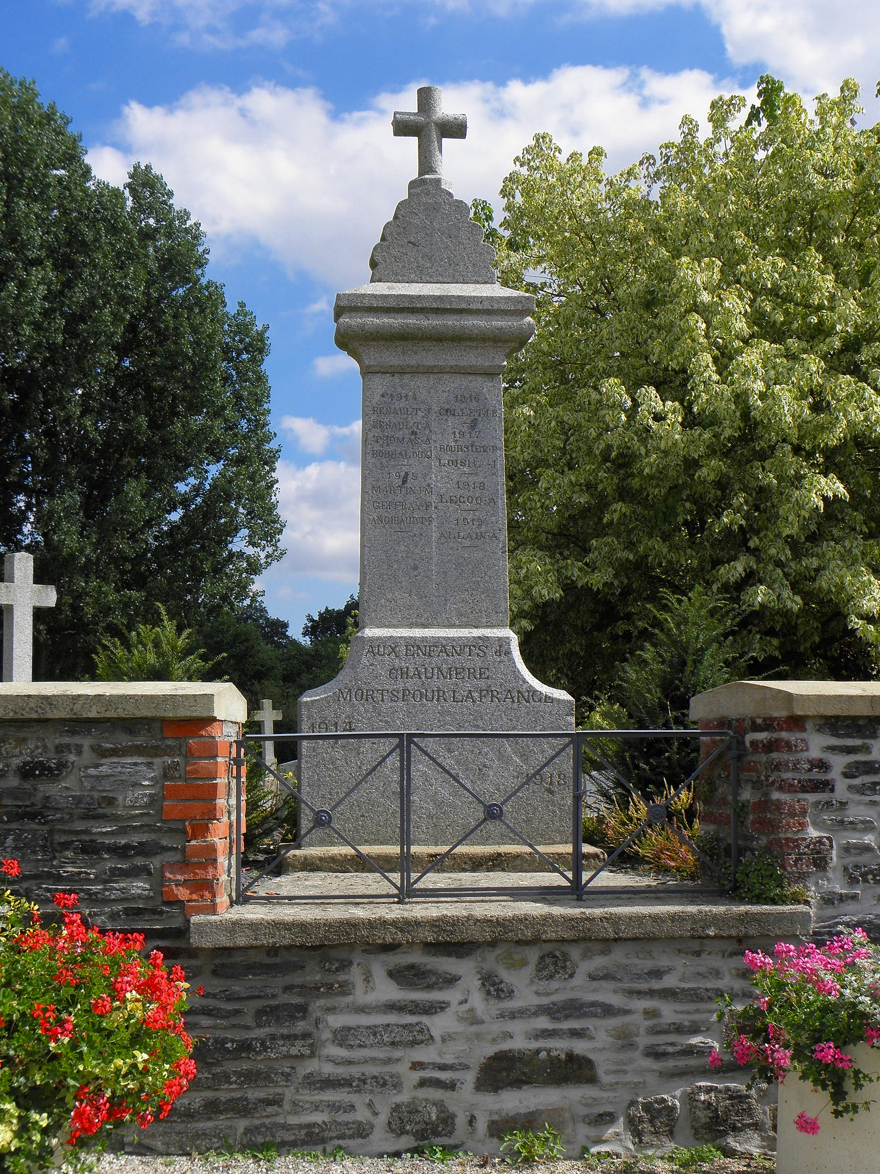 Monument aux morts de Chaumeré, commune de Domagné (35).